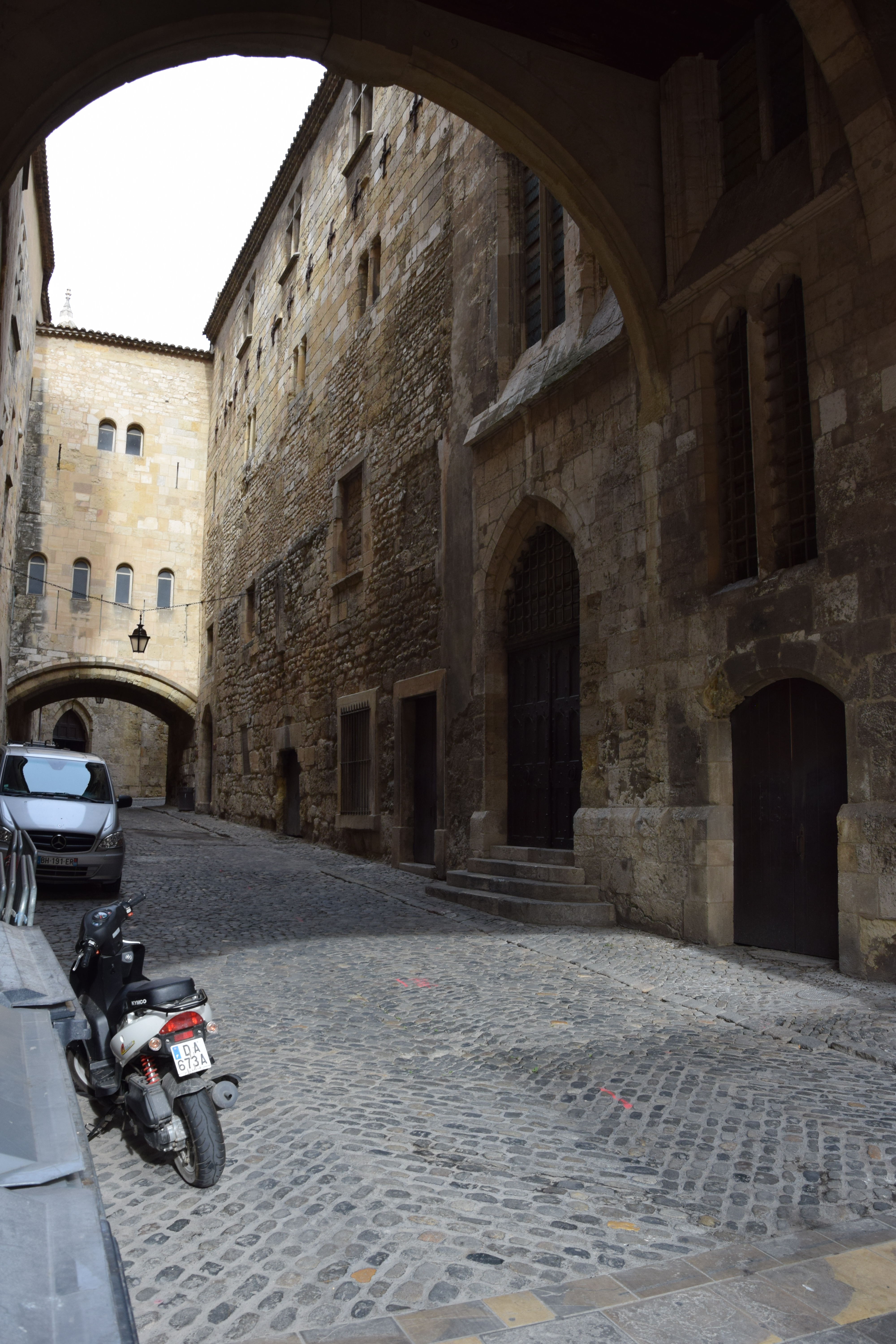 Palais des Archevêques de Narbonne .